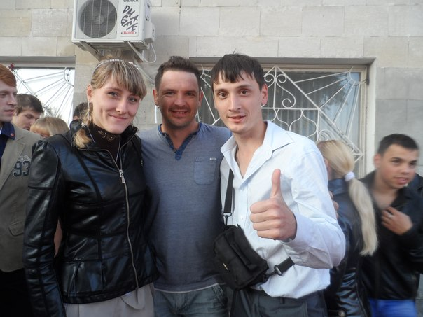 С фанатами